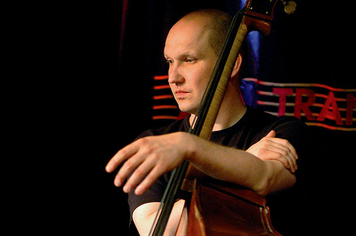 Stefan Weeke (b) im A-Trane, Berlin